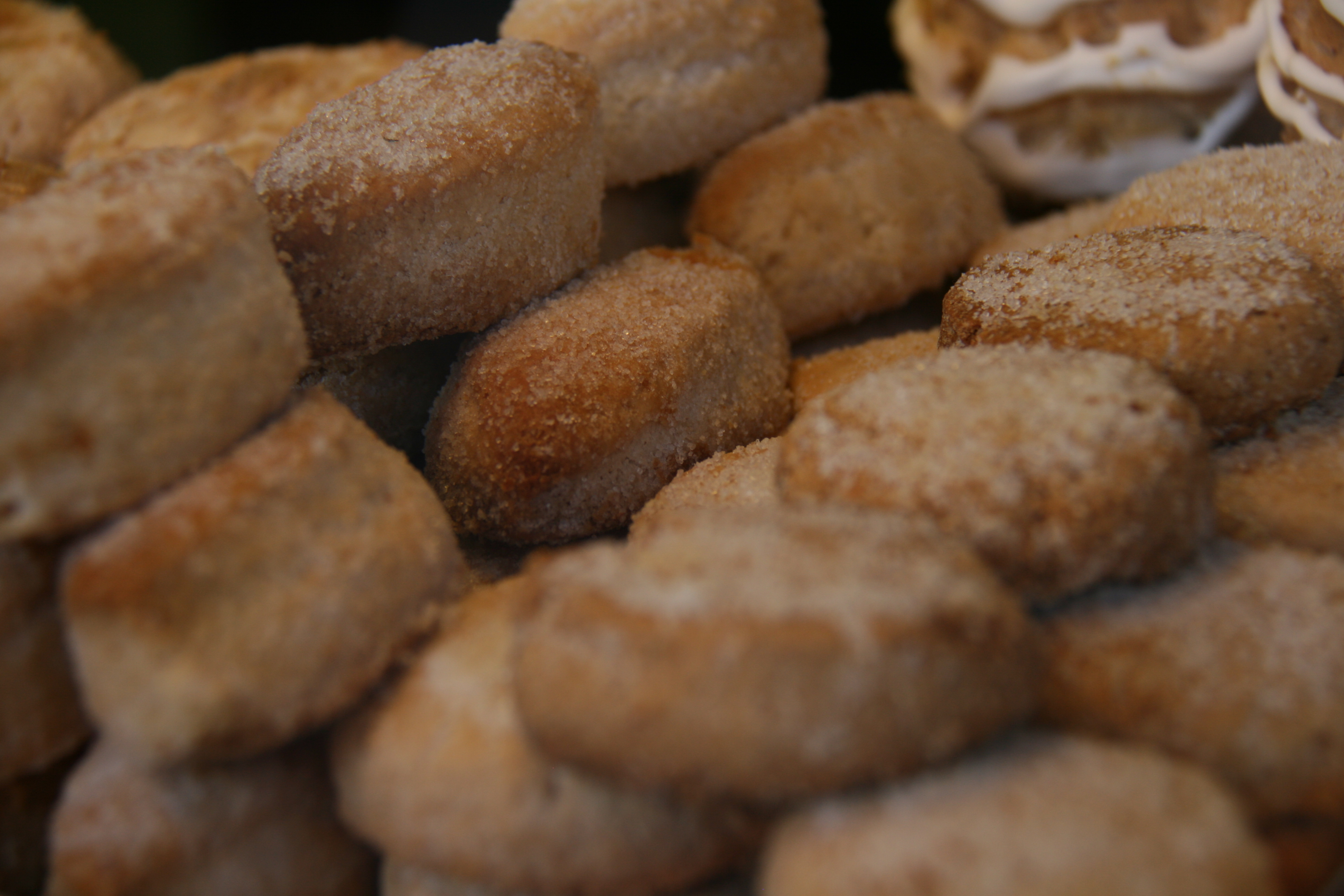 Pastas